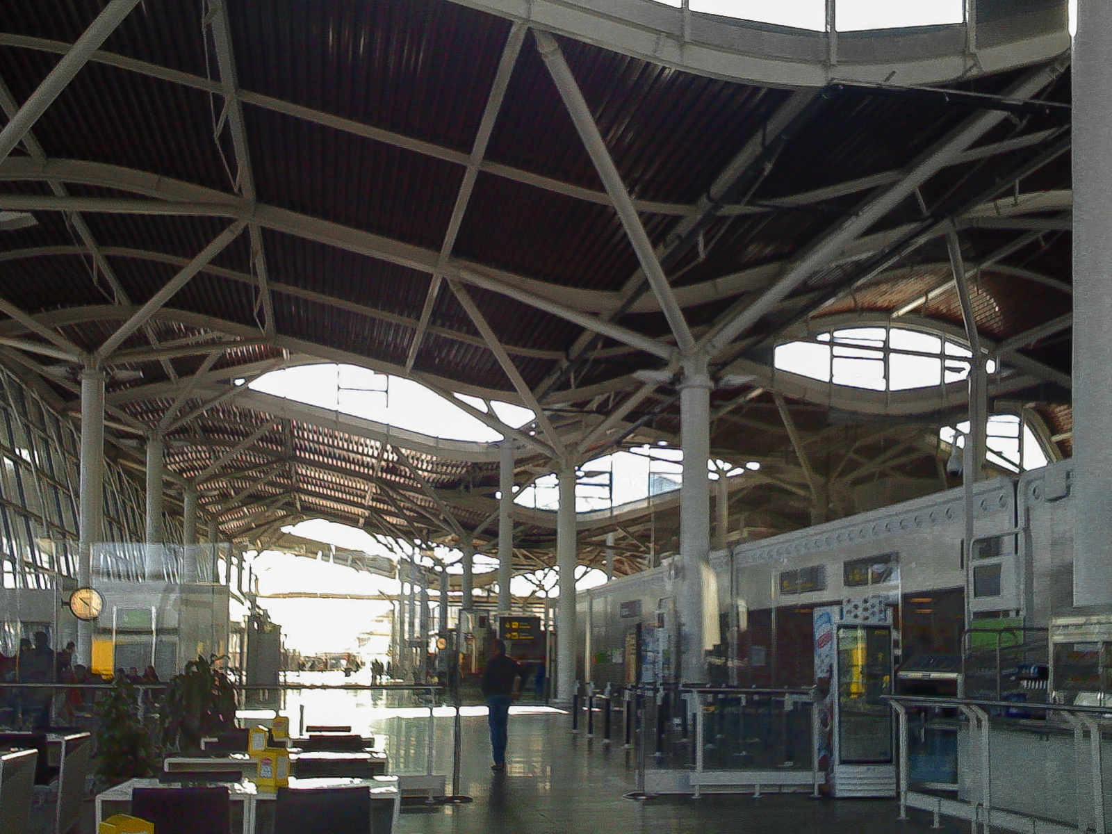 Zaragoza Airport